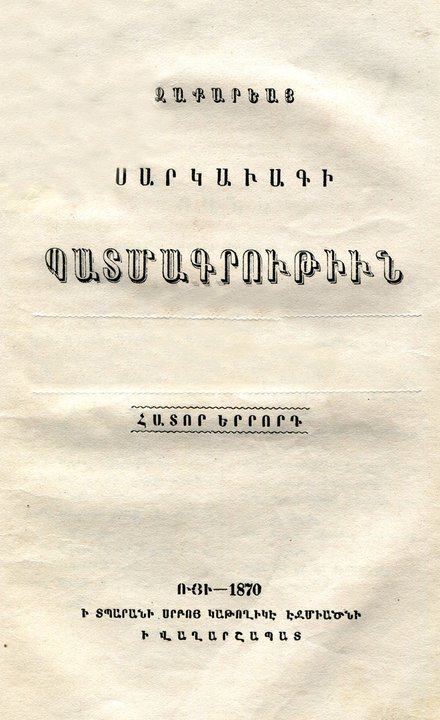 Обложка издания «Истории» армянского историка Закария Саркавага Канакерци